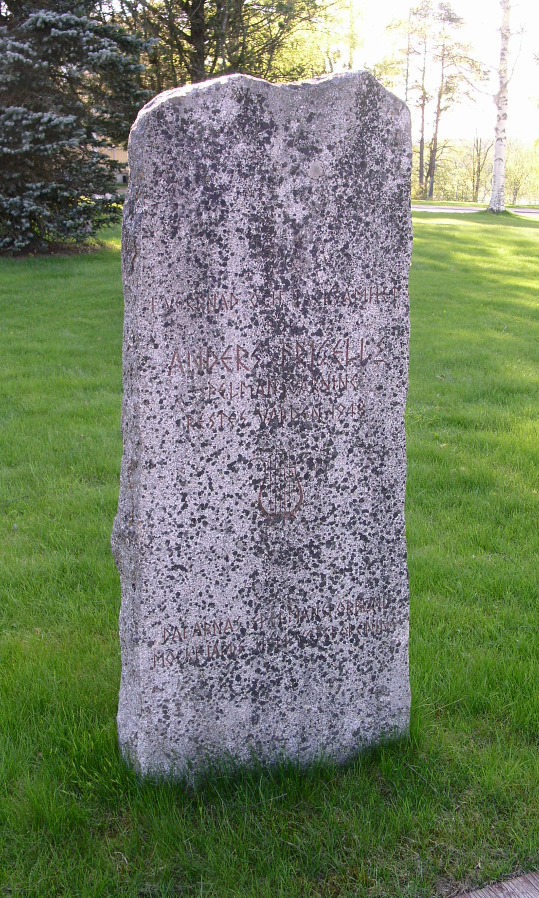 Minnessten över Anders Frisell (spelman) vid Mockfjärds kyrka